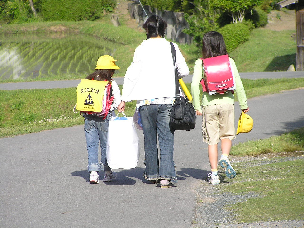 通学（つうがく）には意味が2つある。 児童・生徒・学生が学校へ通うこと。 学校への登下校のこと。 目次 [非表示] 1 学校へ通う 2 登下校 2.1 通学範囲 2.2 形態 2.2.1 どこから通うか 2.2.2 どのような交通手段を使うか 2.3 通学路 2.4 通学時間 [編集] 学校へ通う この節は執筆中です。加筆、訂正して下さる協力者を求めています。 [編集] 登下校 [編集] 通学範囲 通学範囲の制限は以下の二点のどちらか、もしくは両者の組み合わせで決められる。通学範囲について特に規定の無い学校もある。 地域を指定する学区（校区）。 通学にかかる時間で制限する。 [編集] 形態 登下校の形態は、児童・生徒・学生の生活環境等の事情により様々であるが、 どこから通うか どのような交通手段を使うか に大別して考えることにする。 [編集] どこから通うか 義務教育の公立小学校と中学校にあっては、一般に自宅から通う人が多いが、自宅以外から通うものもいる。自宅以外の例としては、学校の寮や下宿が挙げられる。高等学校では、学区がある都道府県の普通科では自宅から通う者が多いが、学区がない都道府県の普通科や専門学科・総合学科では地域・自宅以外から通う例が多く見られる。高等教育や私立学校では、学区（校区）制が無いため自宅以外から通う人の方が多いと考えられる。 [編集] どのような交通手段を使うか 交通手段としては、以下に挙げるものが考えられる。 徒歩 学校から自宅まで近距離の場合、歩いての通学。小学校などでは、登校時に班を作って、集団で登校をする地域もある。 バス 学校から自宅まで中・遠距離の場合に利用。一般に路線バスを用いる。校区が広いところでは小学校、中学校でも認められている学校もあり、そのような場合、バス会社が協力して通学用にバスを運行する例も見られる。 鉄道 学校から自宅まで中・遠距離の場合に利用。電化された鉄道を使う場合は電車を使うことが多いため、「電車通学」と言う方が一般的。ただし、気動車などの非電化の鉄道路線からの通学も「電車通学」と言うことが多い。 船舶 橋の架かっていない海・湖・川などを渡って通学する場合に利用。島嶼部を中心に多く見られる。 自転車 学校から自宅まで中距離の場合に利用。小学校・中学校・高等学校などでは、学校に許可を取らなければならないのが一般的。（自転車通学を参照） バイク 学校から自宅まで遠距離の場合に利用。バイク通学。高等学校では禁止されている学校が多いが、過疎地ではバスなどの公共交通機関が少ないため、例外的に認められているところがある。学校に許可を取らなければならないのが一般的。 以上のものを組み合わせた通学形態をとることもある。例えば、自宅から最寄の駅を利用するに当たって、駅まで自転車を利用し、学校の最寄り駅から徒歩といった交通手段が考えられる。また、スクールバスという、自宅などと学校を結ぶバスを利用するという形態もある（学校法人が直接運営するもの、学校と契約しているバス会社が運行するもの、公立学校を持つ自治体が運行するものなどさまざまで、自治体運行は通学区域が広大なうえ、冬が長く徒歩通学時の安全確保が難しい北海道で多い）。また、特に事情がある場合など、家族等による自動車での送迎などもある。 バスや鉄道、船舶を利用する場合、学校に申請することで、通学定期券を利用することができる。 [編集] 通学路 自宅などから学校へ通う道のこと。登校時間帯は自動車通行禁止となっている道もある。 校区が広い場合は、地元の公立小中学校でも、自宅から学校まで数キロメートルもするところもある。また、地元の学校に通っていない場合は、通学路が数十キロメートルあるというのも珍しくない。 [編集] 通学時間 通学にかかる時間は、自宅等と学校の場所によってまちまちである。近ければ数十秒、遠ければ1時間以上を要することもあり、その幅が広い。 普通、学校は始業時刻・終業時刻が定められており、通学の時間帯は、この始業・就業時刻と通学の所要時間とで決まってくる。また、下校の時間帯は、その日の日課や放課後の活動の有無などによっても変わってくることがある。バスや鉄道、船舶などの公共交通機関を利用する場合、通学の時間帯は通勤ラッシュと重なることもあり、特に初等教育期などにあっては、児童にとって負担となることもあり、これらを避けるための配慮を必要となる場合もある。